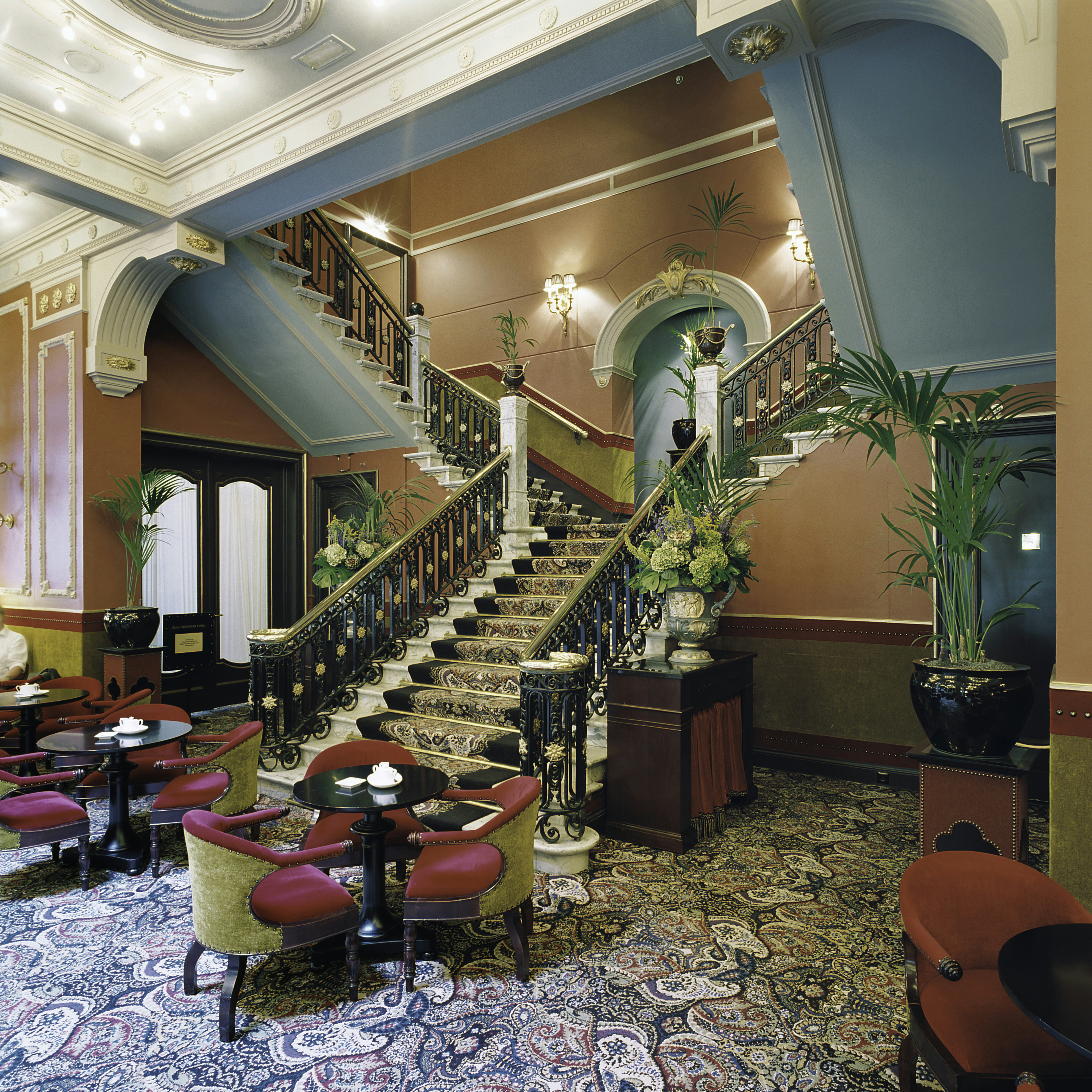 Hotel des Indes: Interieur, overzicht van het trappenhuis op de begane grond, bij het restaurant